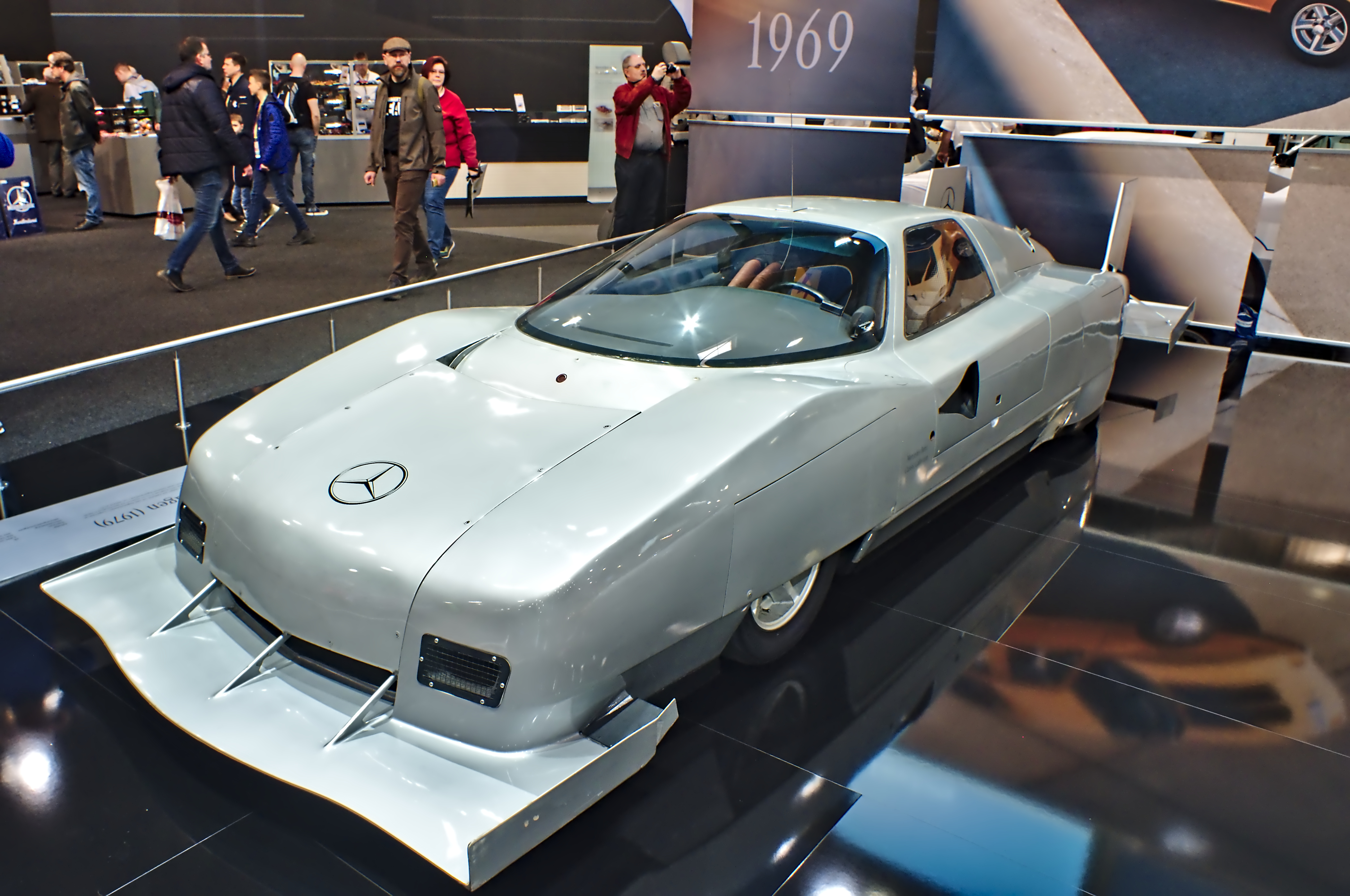 Techno Classica 2019